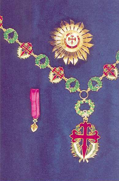 Ordem de Santiago da Espada